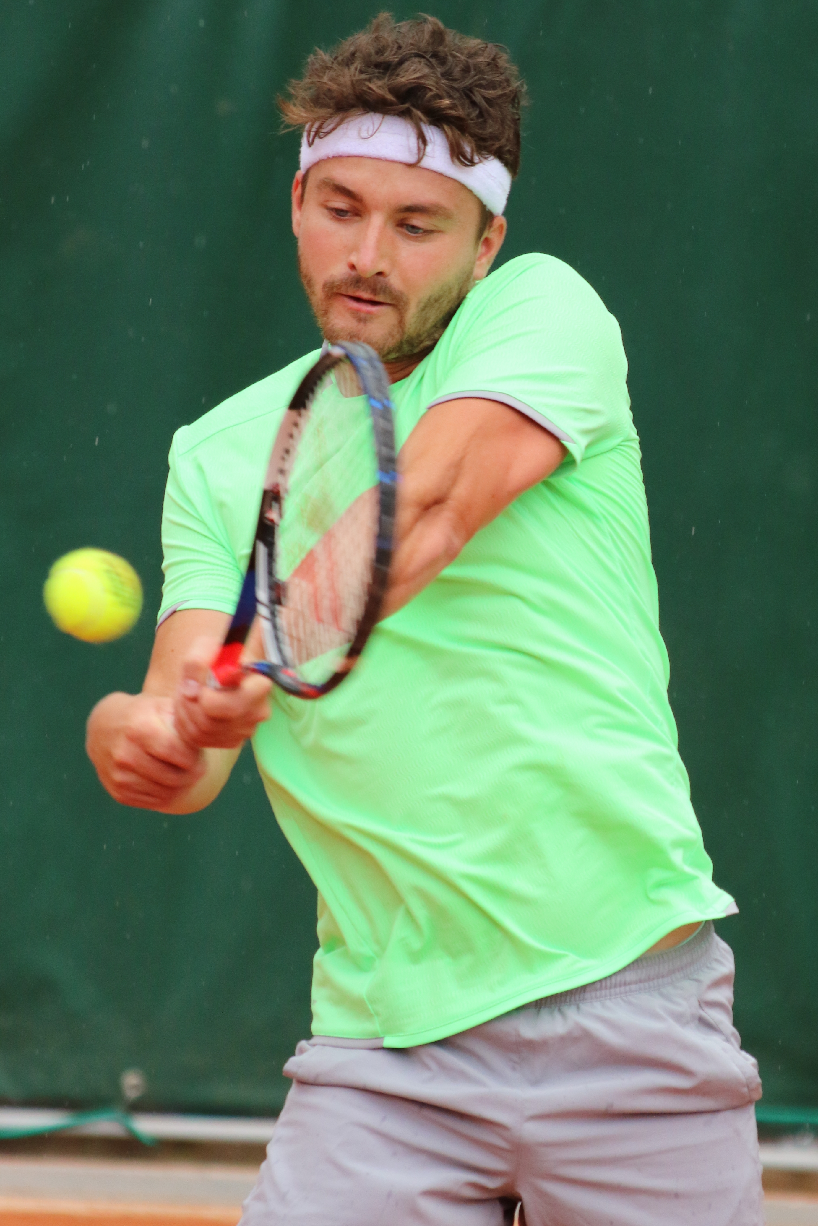 O'Mara RG19 (28)